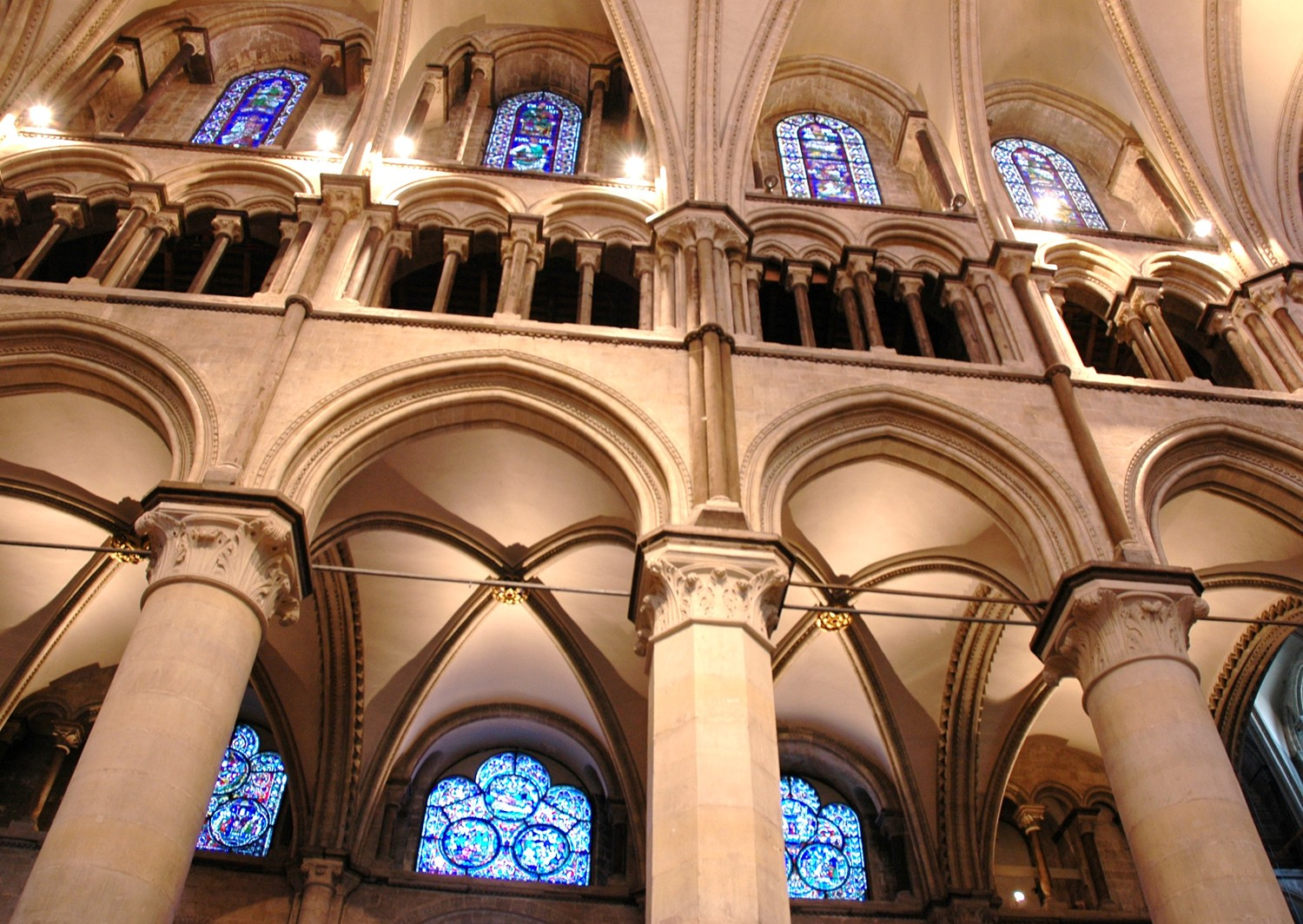 Lateral nau central de la Catedral de Canterbury